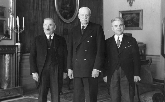 Reunión del ministro yugoslavo de Comunicaciones, Mehmed Spaho con el presidente polaco, Ignacy Moscicki. De izquierda a derecha: Mehmed Spaho, Moscicki Ignacy y el ministro polaco de Comunicaciones, Julius Ulrych.